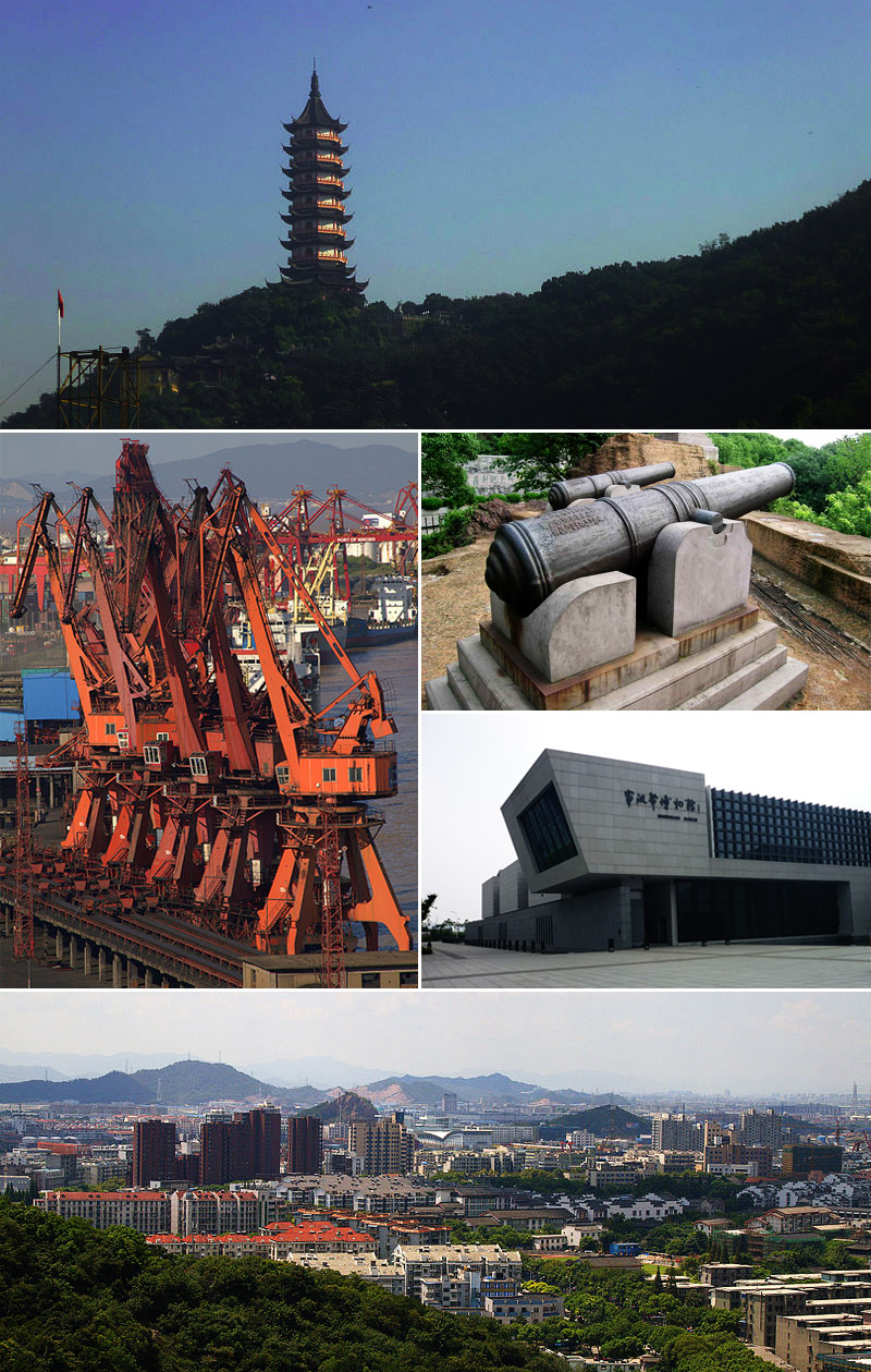 2010年的镇海城区 浙江宁波镇海招宝山炮台上的火炮。The cannons on the Zhao Bao Shan in Zhenhai, Ningbo, Zhejiang, China.